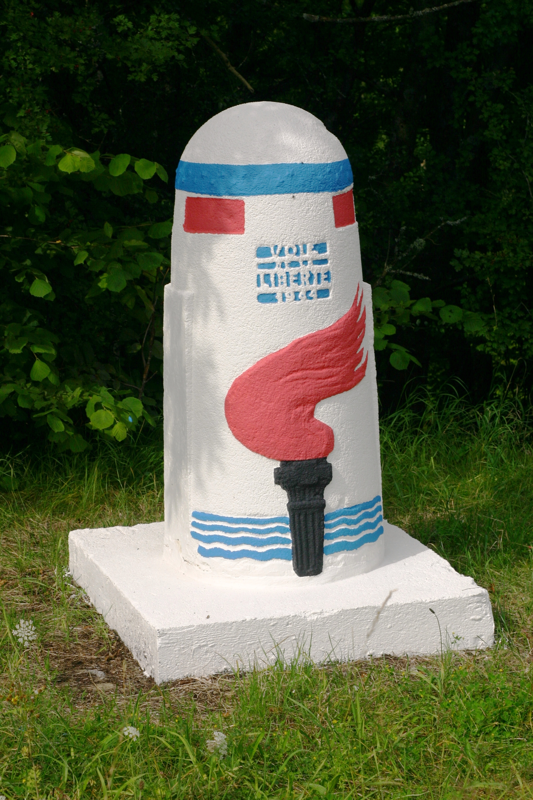 E Kilometersteen vun der Voie de la Liberté zu Maartel ronn 300 Meter vum Monument vun de Chasseurs Ardennais um PK 161,6 vun der N 4 op der rietser Säit a Richtung Baaschtnech. Kategorie:Voie de la Liberté Kategorie:Arelerland